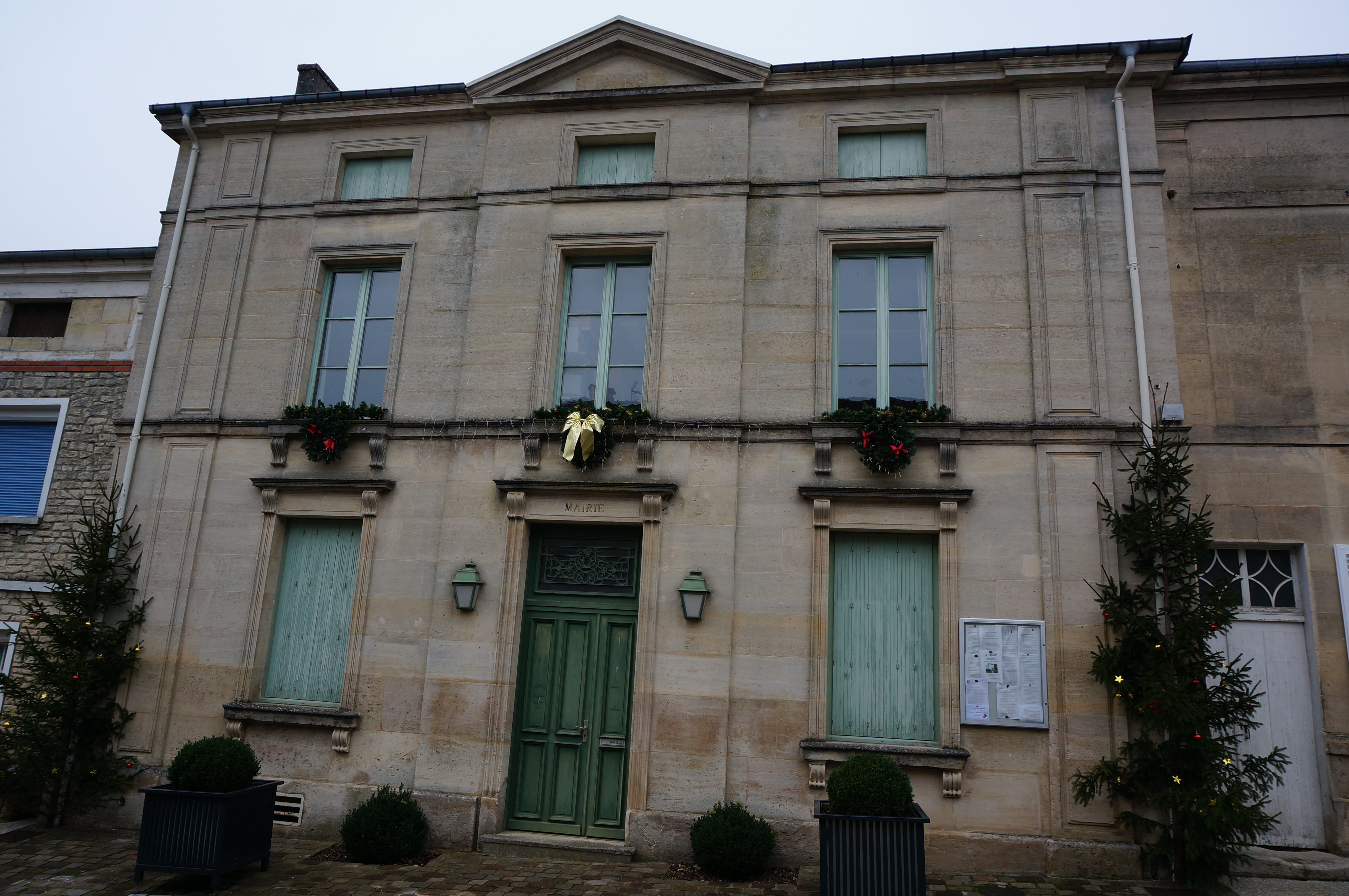 vues à Ville-sur-Saulx.